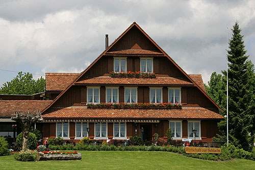 Wirtschaft zur Schlacht (auf dem ehem. Schlachtfeld)